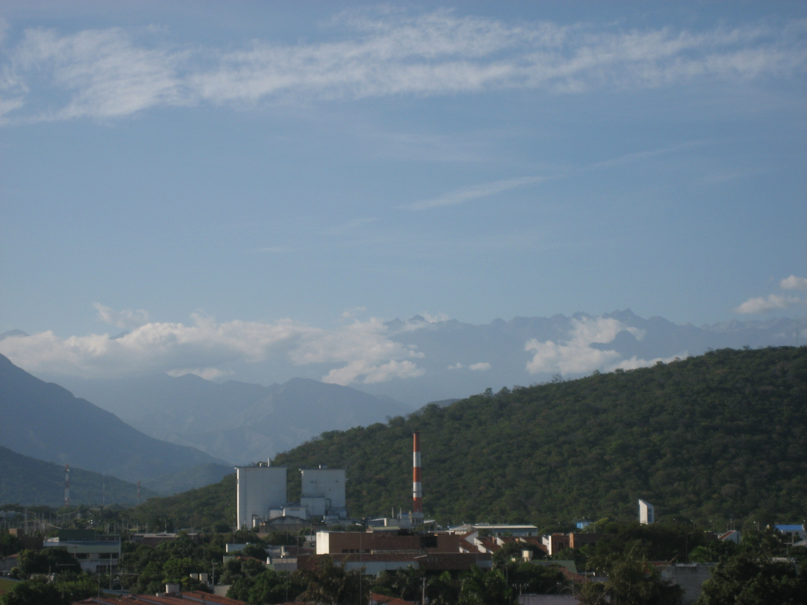 Sierra Nevada de Santa Marta. Valledupar, Colombia.